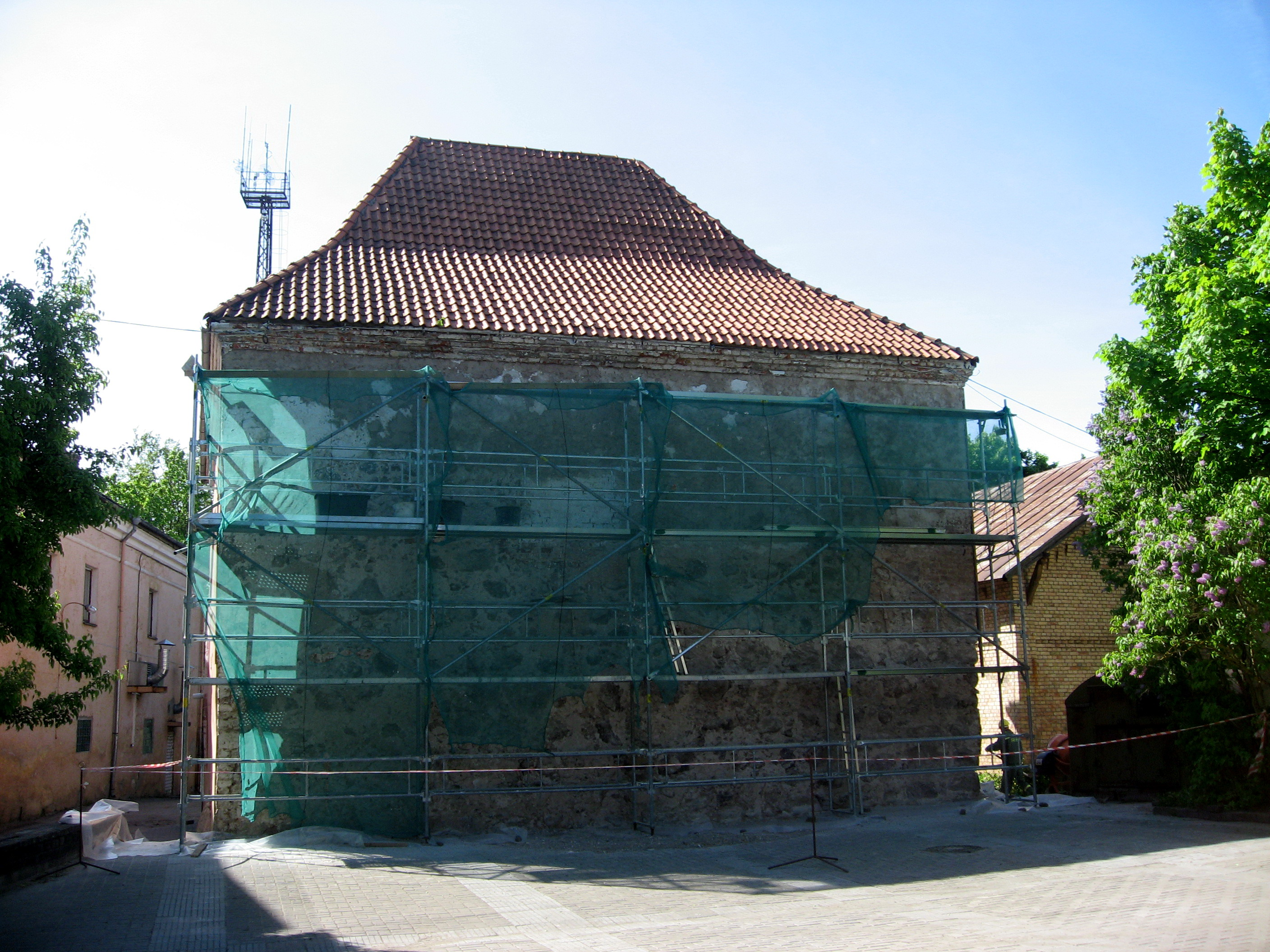 Tukums, hradní věž